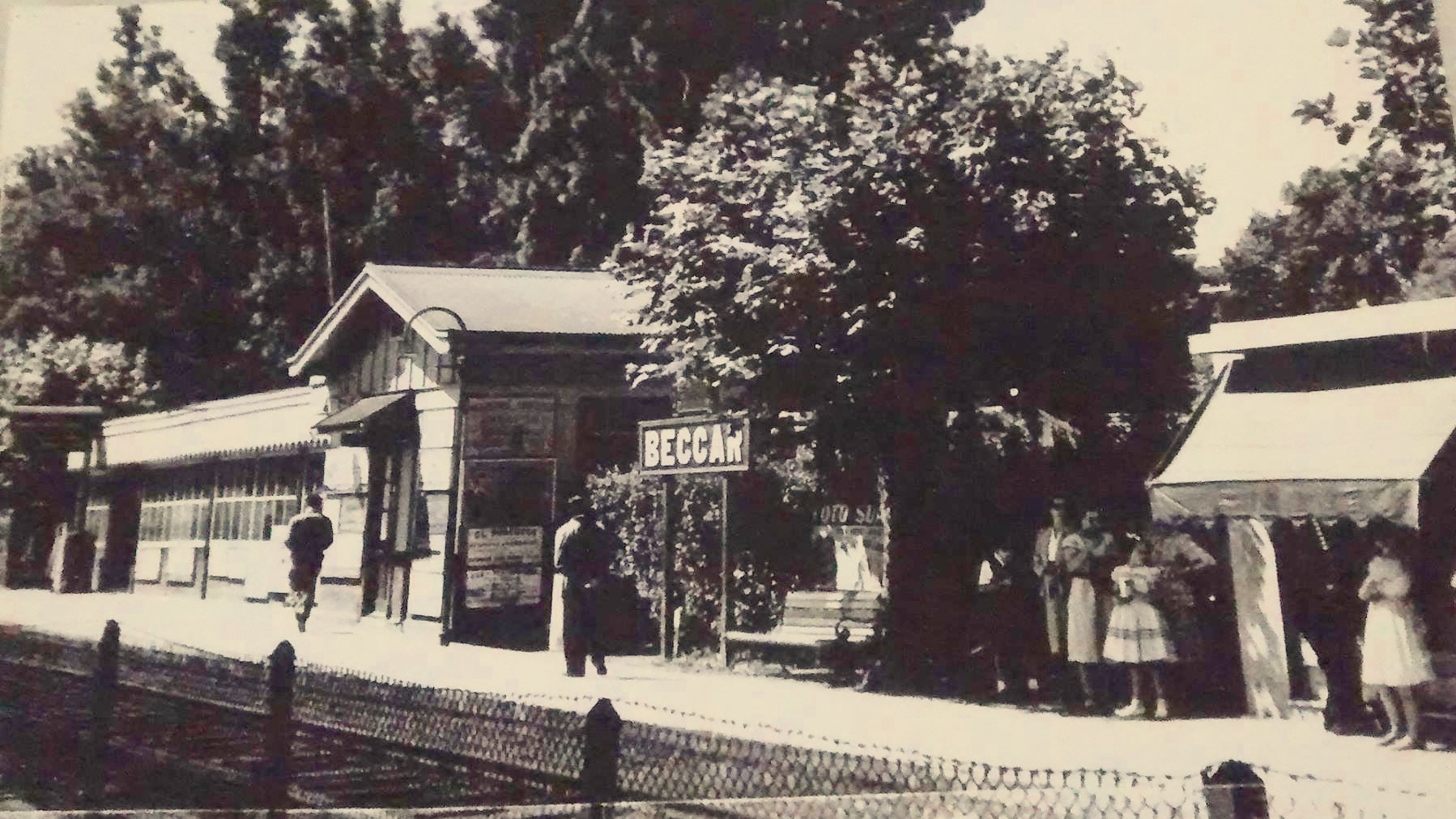 Estacion Beccar Ex Linea Mitre